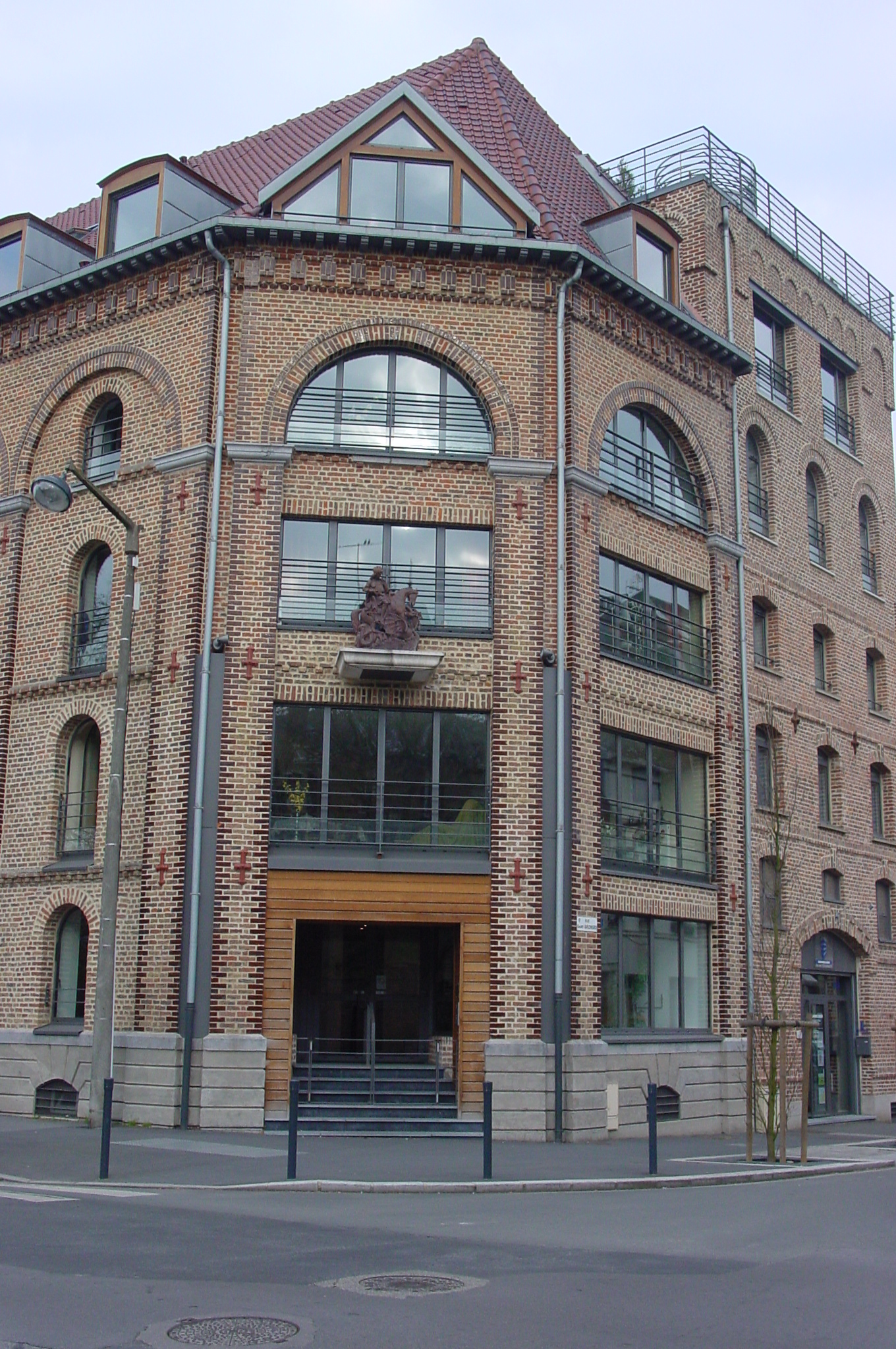 La brasserie Saint-Georges à Cambrai, ouverte en 1770 et réhabilitée pour être transformée en logements en 2003